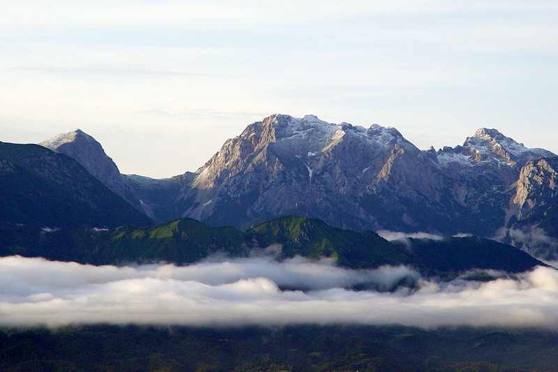 Kamniško sedlo z Brano in Planjavo z Rašice.